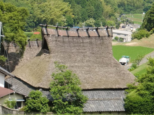 大阪府能勢町長谷の棚田の茅葺の民家(入母屋造)